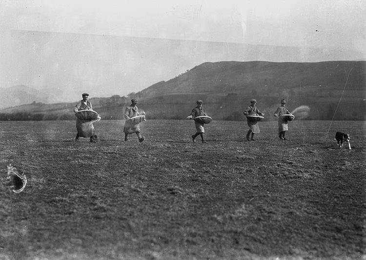 Ffotograffydd/Photographer: P B Abery (1877?-1948) Nodyn/Notes: Image of men broadcasting seed Dyddiad/Date: [194-?] Cyfrwng/Medium: Negyddion gwydr / Glass negatives Maint/Dimensions: 119 x 163 mm. Cyfeiriad/Reference: PBA19/21 Rhif cofnod / Record no.: 4461557 Rhagor o wybodaeth am gasgliad P B Abery yn Llyfrgell Genedlaethol Cymru More information about the P B Abery Collection at the National Library of Wales